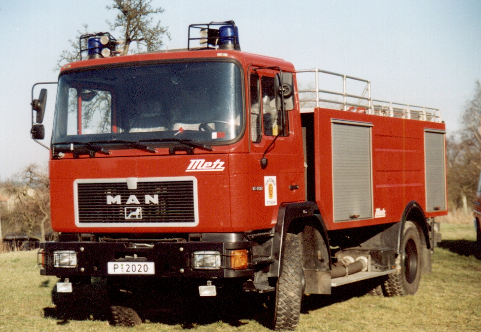 Tanklöschfahrzeug 16/45 Typ Brandenburg. Stationiert in Potsdam im Ortsteil Bornim bei der dort ansässigen freiwilligen Feuerwehr; siehe auch